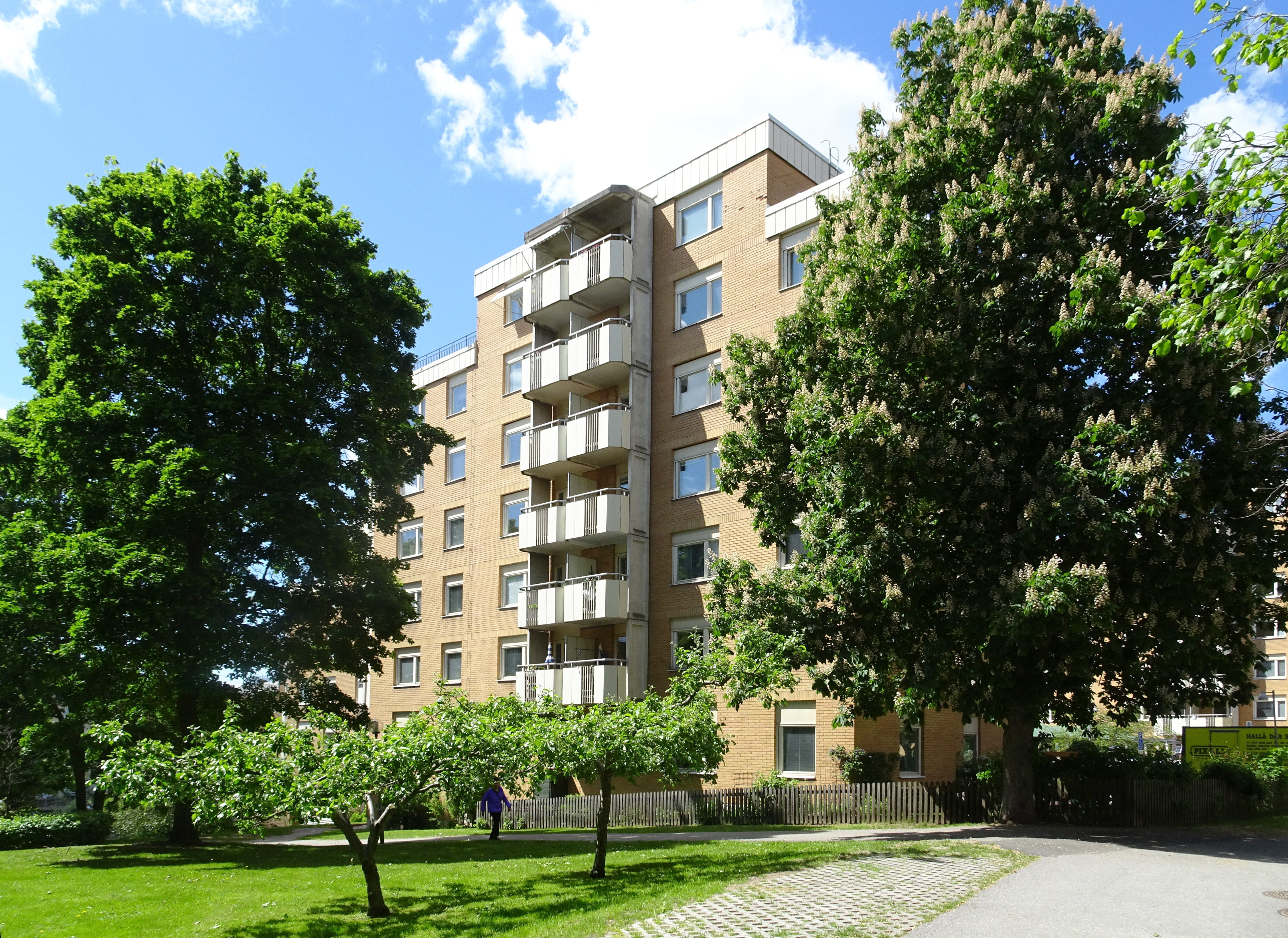 Reimersholme, Reimersudde Seniorboende, arkitekt Björn Westerberg